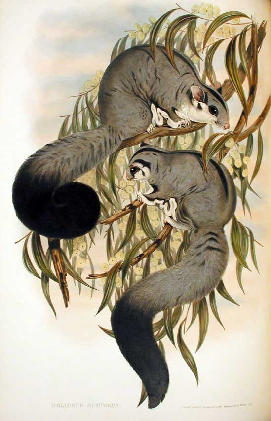 Petaurus norfolcensis (orig. Belideus sciureus)